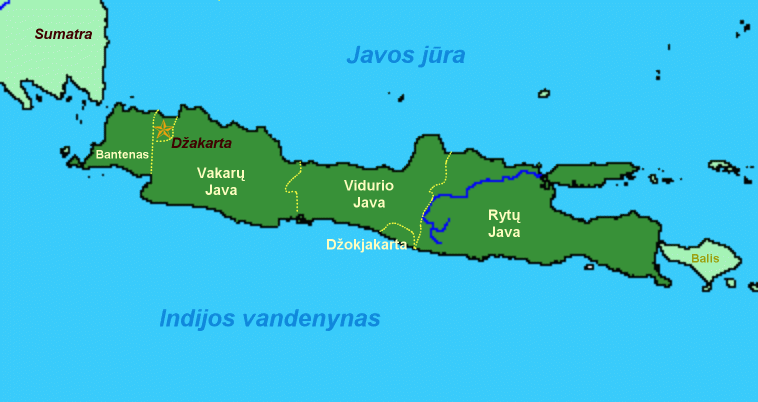 Javos sala